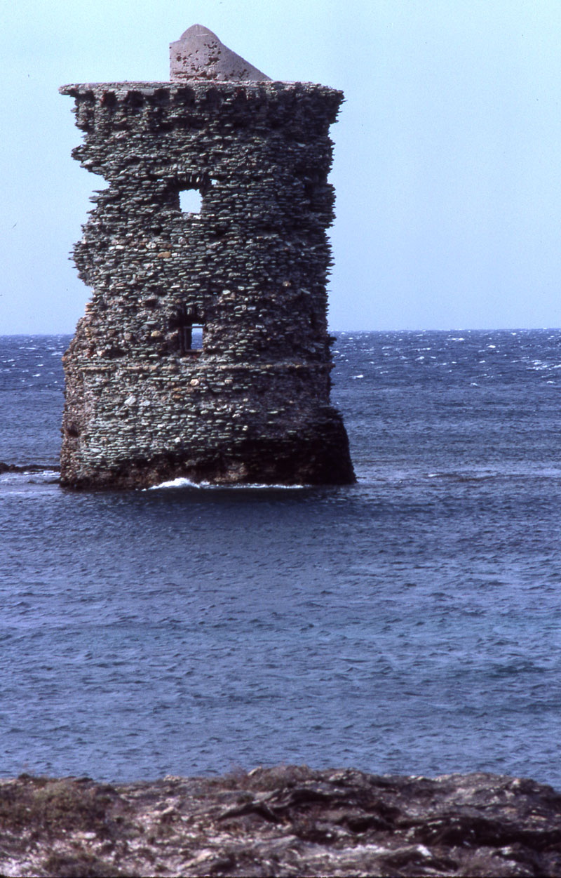 Tour de guet gênoise en Corse Lieu : Cap Corse, Corse, France Auteur : Photo personnelle